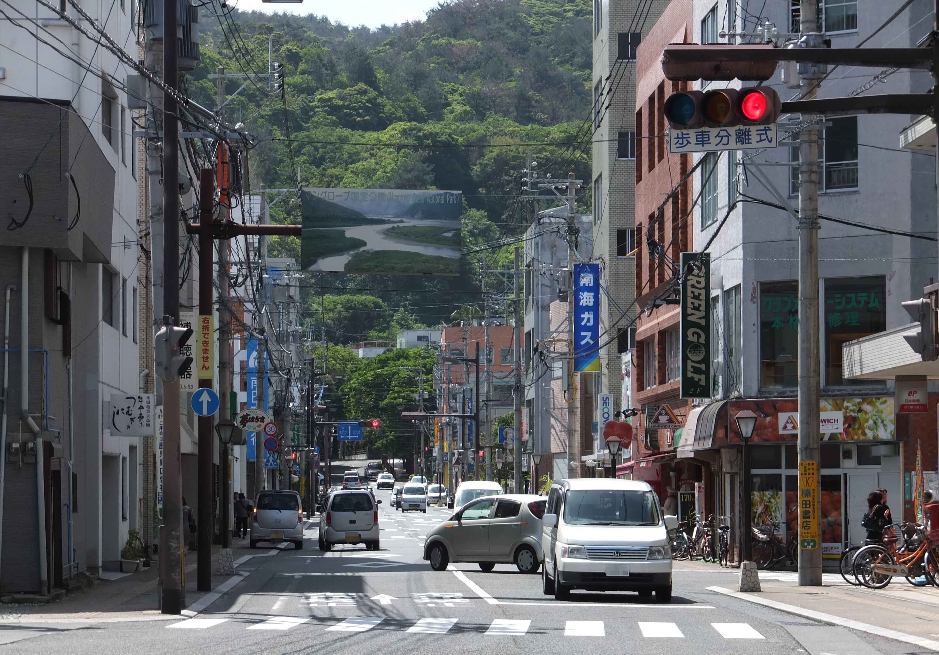 奄美市中心部。奥にあるのはおがみ山。